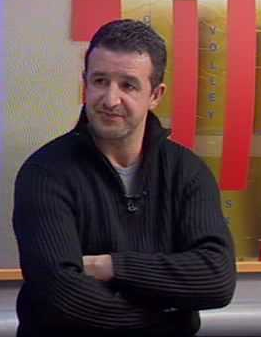 Saib.